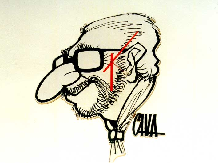 Orologio con caricatura di Osvaldo Cavandoli appeso nel suo studio nel novembre del 2011.